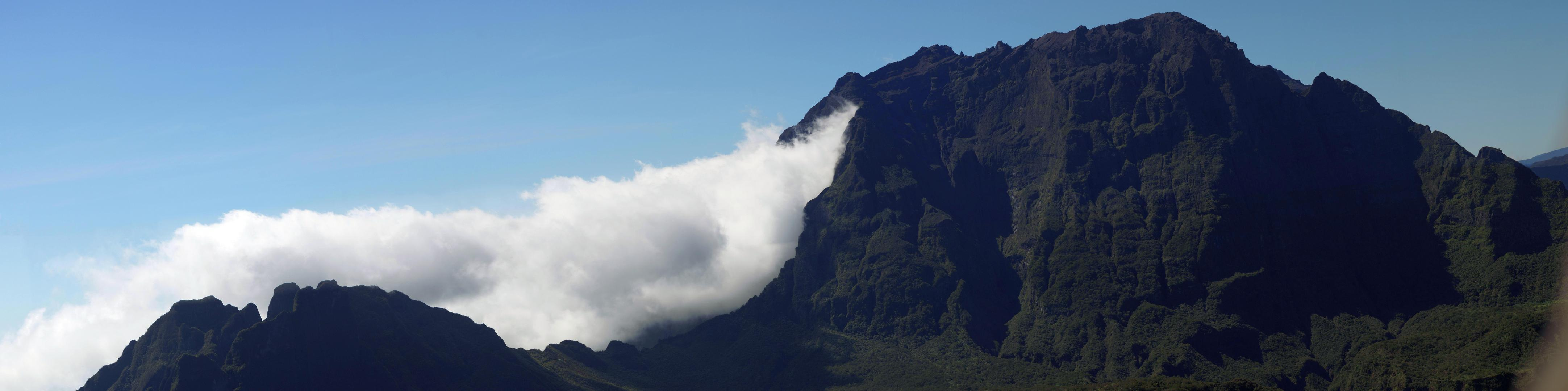 Panorama du piton des neiges vu depuis le Maïdo. Réaliser par l'assemblage de 28 photos (2 lignes de 14 photos)